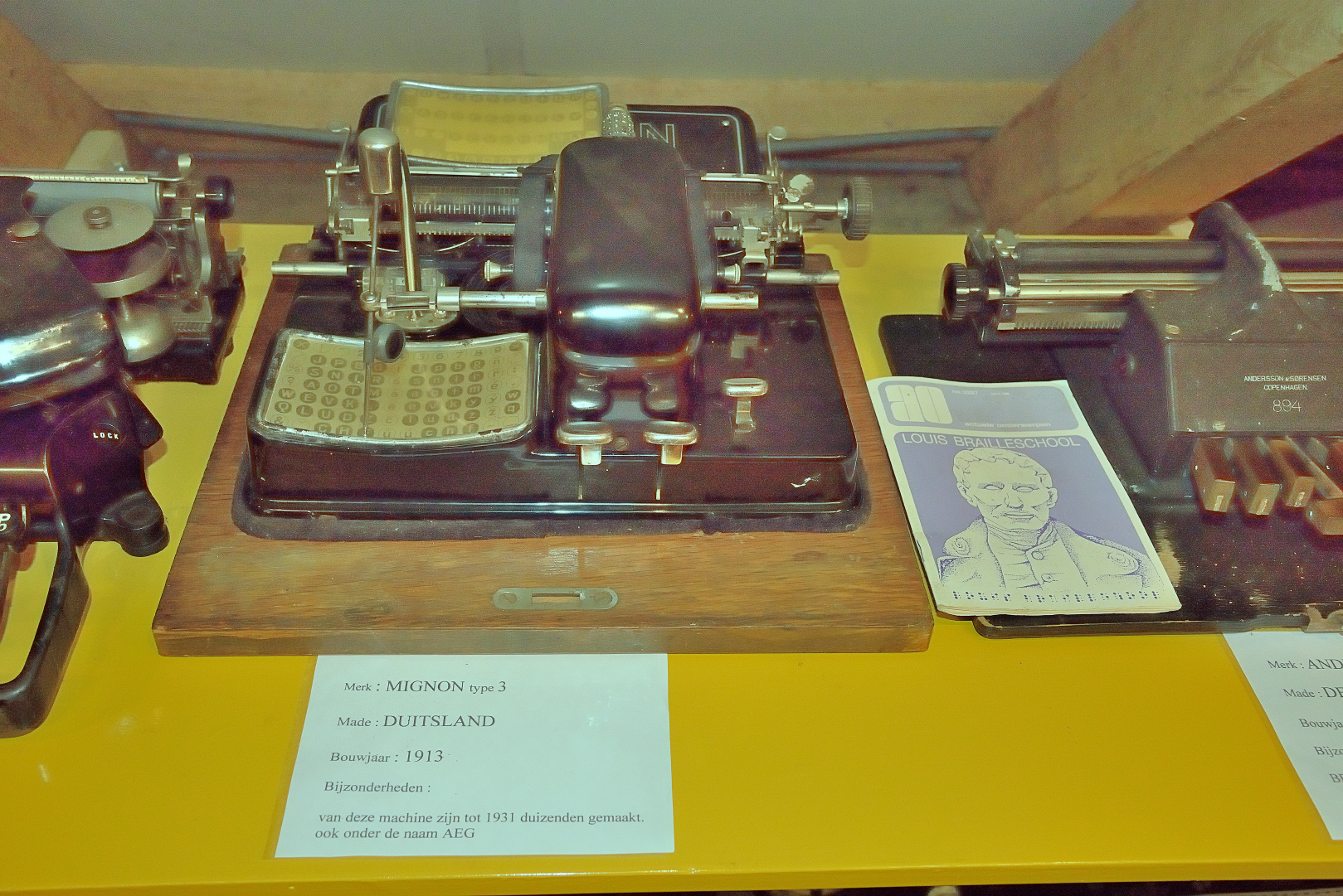 De Wachter, Zuidlaren, typemachine Mignon type 3, gebouwd in 1913